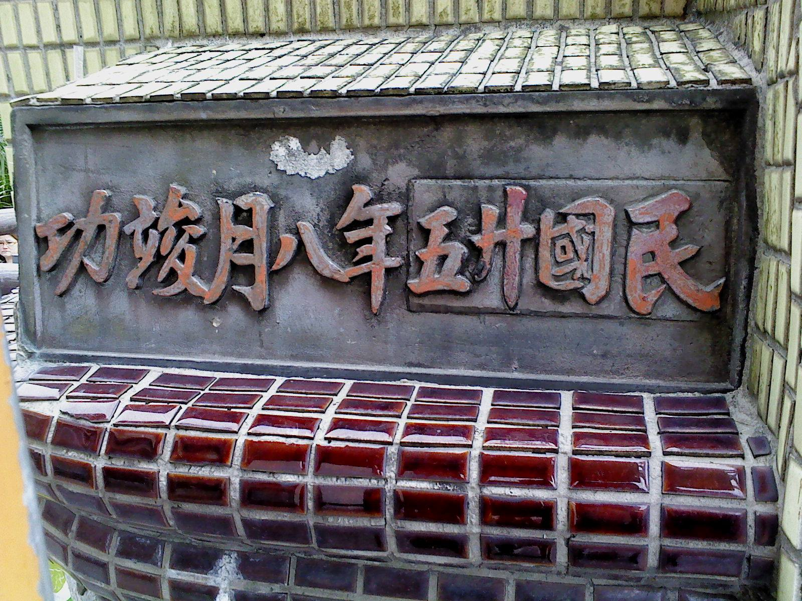 中文（台灣）: 碧潭吊橋竣工日期銘記